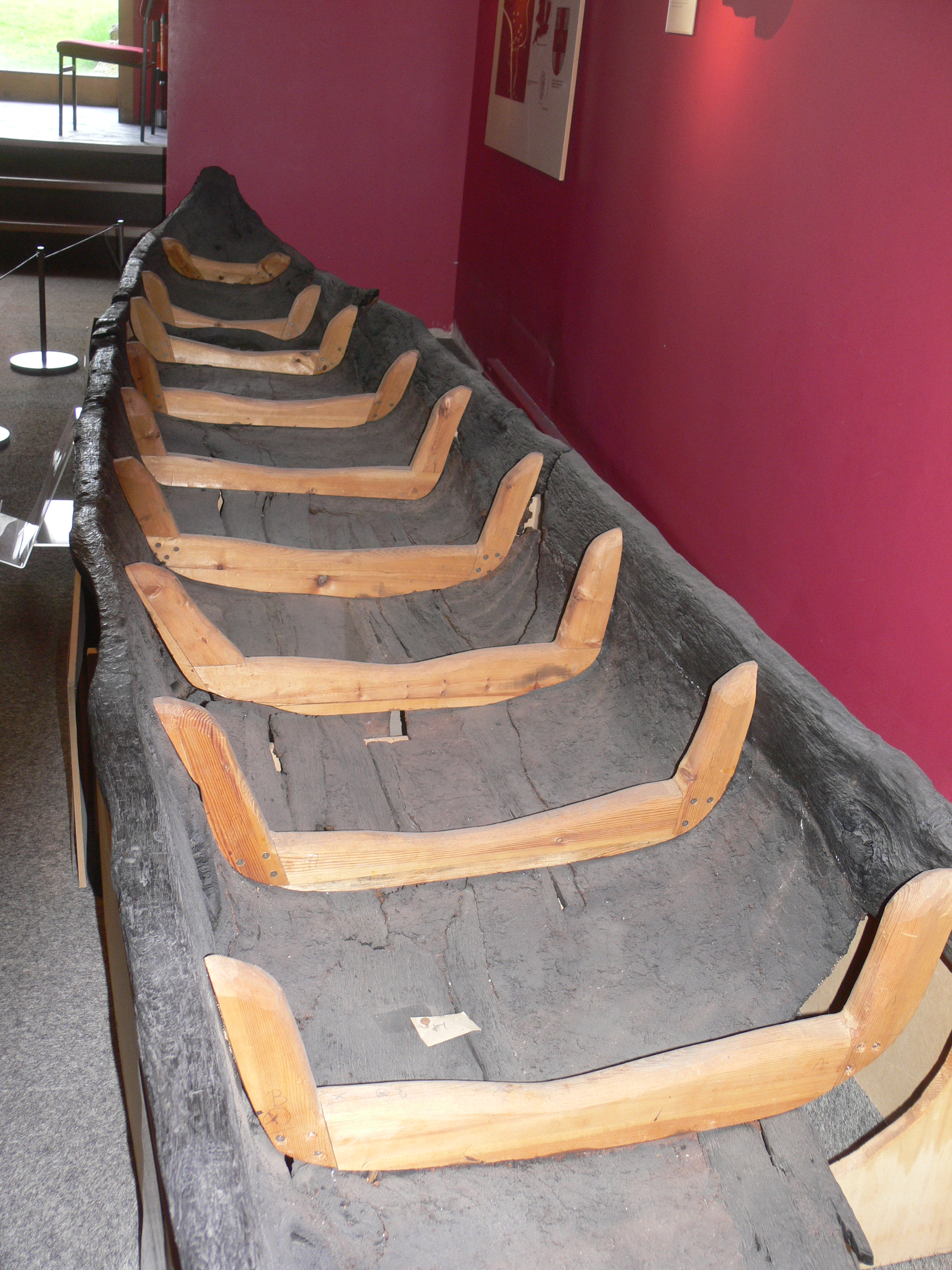 Frühskandinavisches Boot. Einbaum. Yorkshire Museum in York